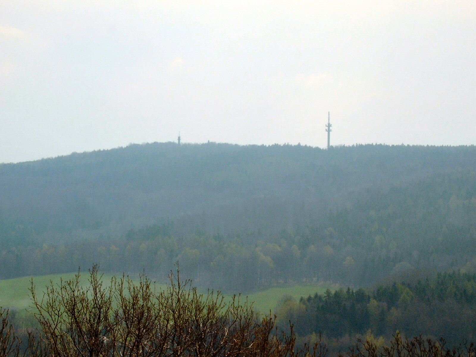 Ungerberg von der Götzinger Höhe aus